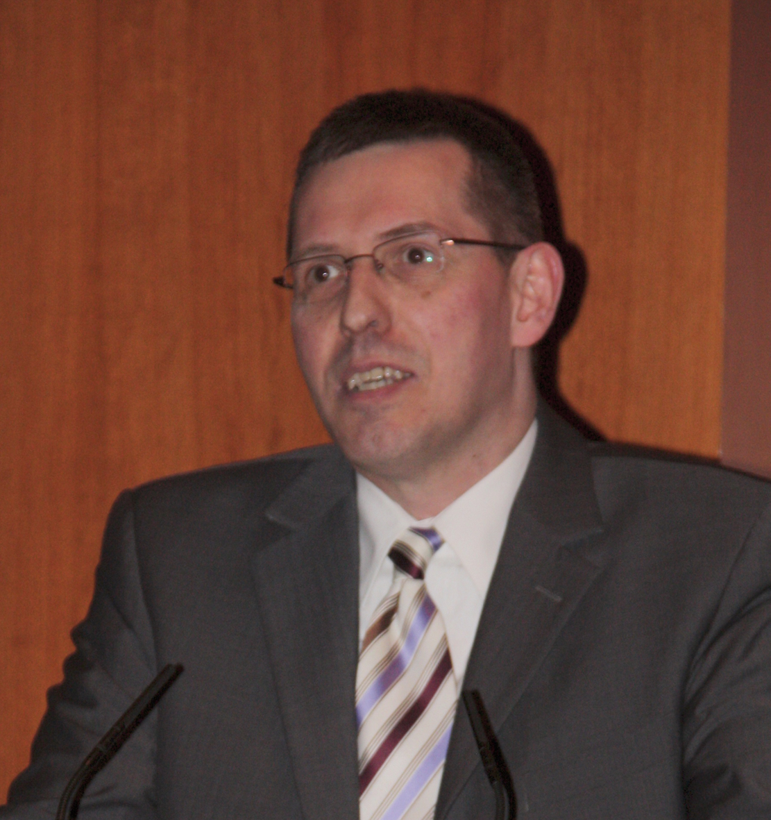 Pressefotos des LSVD-Bundesvorstands: "Diese Fotografien der Vorstandsmitglieder sowie der Mitarbeiterinnen und Mitarbeiter des LSVD dürfen im Rahmen der Berichterstattung über den LSVD kostenfrei verwendet werden. Bitte geben Sie als Quelle "LSVD" bzw. den/die FotografIn an. Wir bitten um Zusendung eines Belegexemplars an presse(at)lsvd.de (für digitale Publikationen) bzw. an die LSVD-Bundespressestelle, Postfach 04 01 65, 10061 Berlin" ...